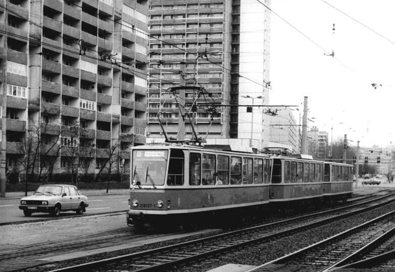 ADN-ZB-Senft-15.3.89-frs-Berlin: Tatrabahnen-Großzüge im Einsatz- Tatrabahnen der Linien "18" und "63" rollen seit wenigen Tagen wieder durchgängig über die Leninallee. Die BVB setzt auch sogennnte Großzüge - bestehend aus Triebwagen- Triebwagen- Beiwagen - ein, die bis zu 350 Fahrgäste aufnehmen können, wie hier in der Mollstraße." Information added by Wikimedia users.Links im Bild ein Haus des Plattenbautyps P2. Das Hochhaus ist vom Typ Mittelganghaus und eine besondere Modifikation. Es stand an der heutigen Ecke Moll-/Otto-Braun-Straße, wurde abgerissen und durch den Neubau des Hochhauses der Mercedes Benz Bank ersetzt.